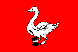 Vlag gemeente Landsmeer